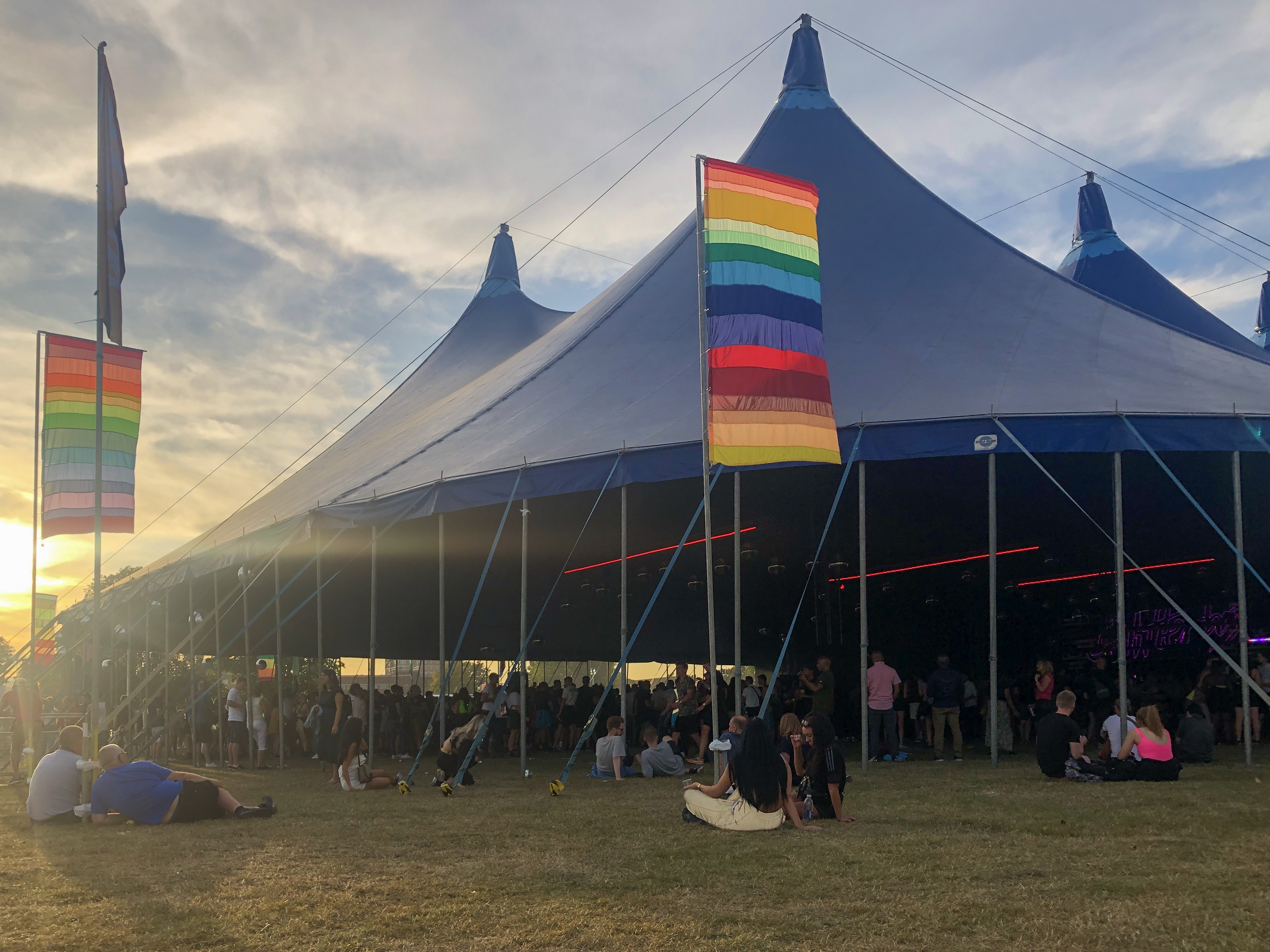 Defected London FSTVL in Central Park, East London